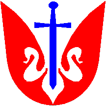 Česky: znak obce Měrotín